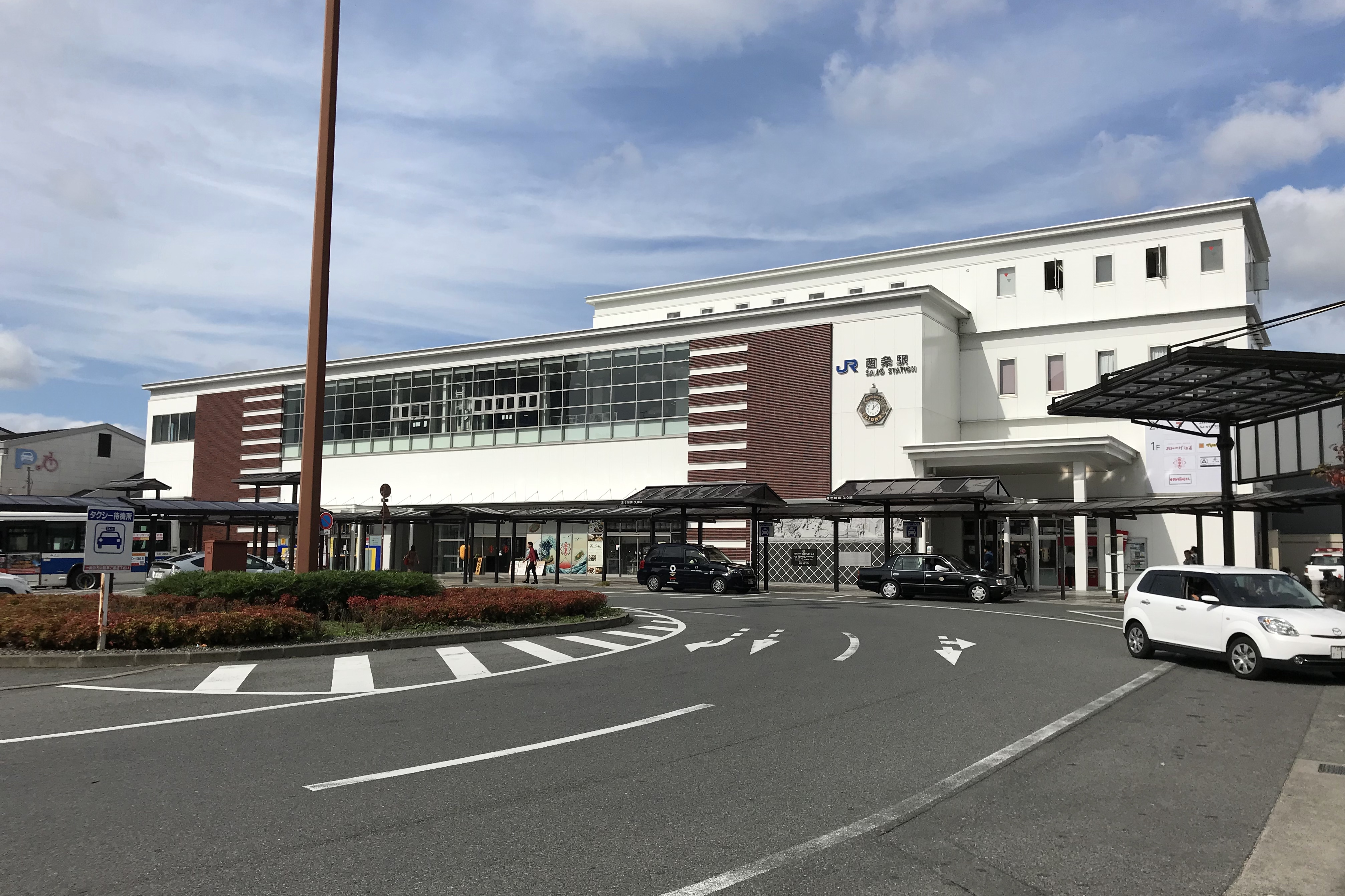 JR西日本山陽本線西条駅南口駅舎